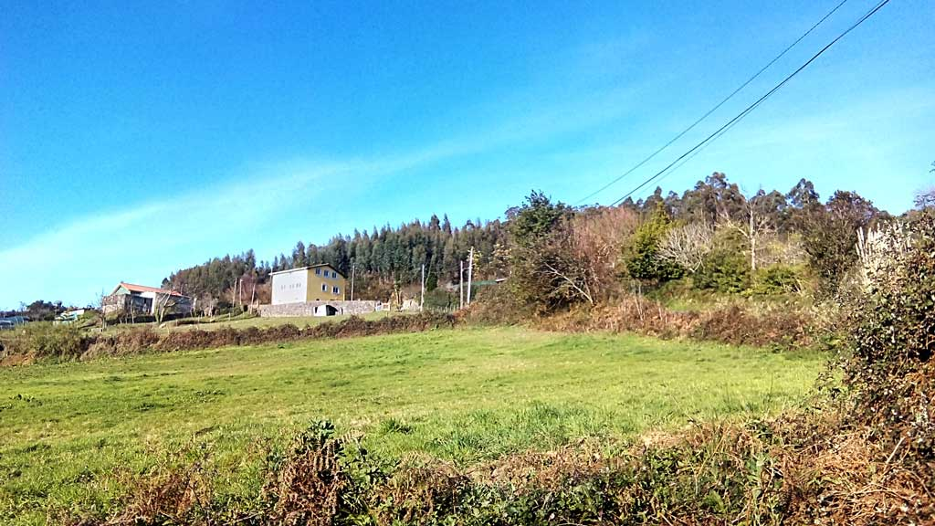 Vista do Cucheiro, Sedes.